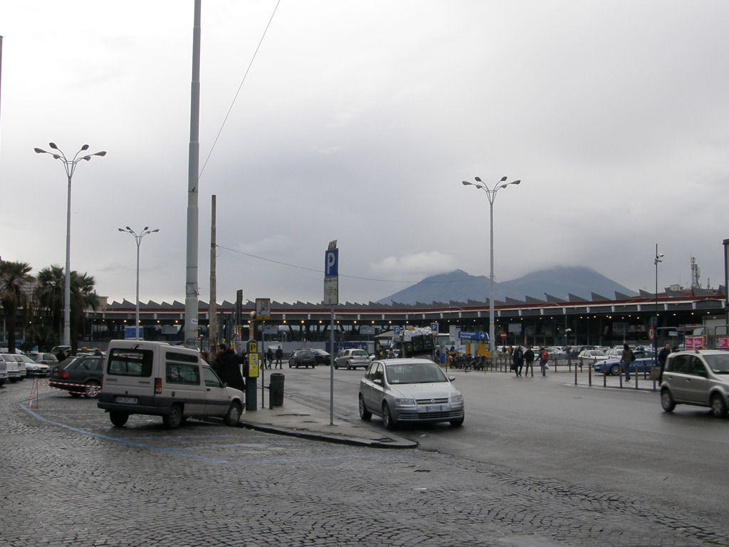 Stazione di Napoli Centrale